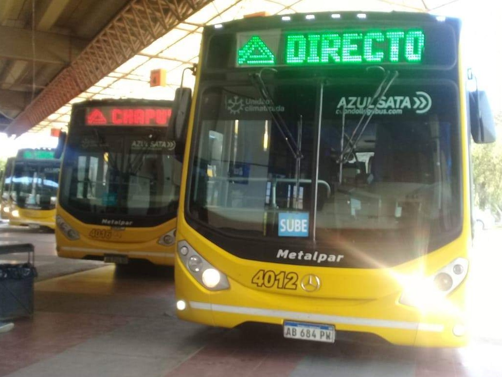 Mercedes-Benz de la empresa Azul SATA, explotadora de la línea A o 910, controlada por Rosario Bus.